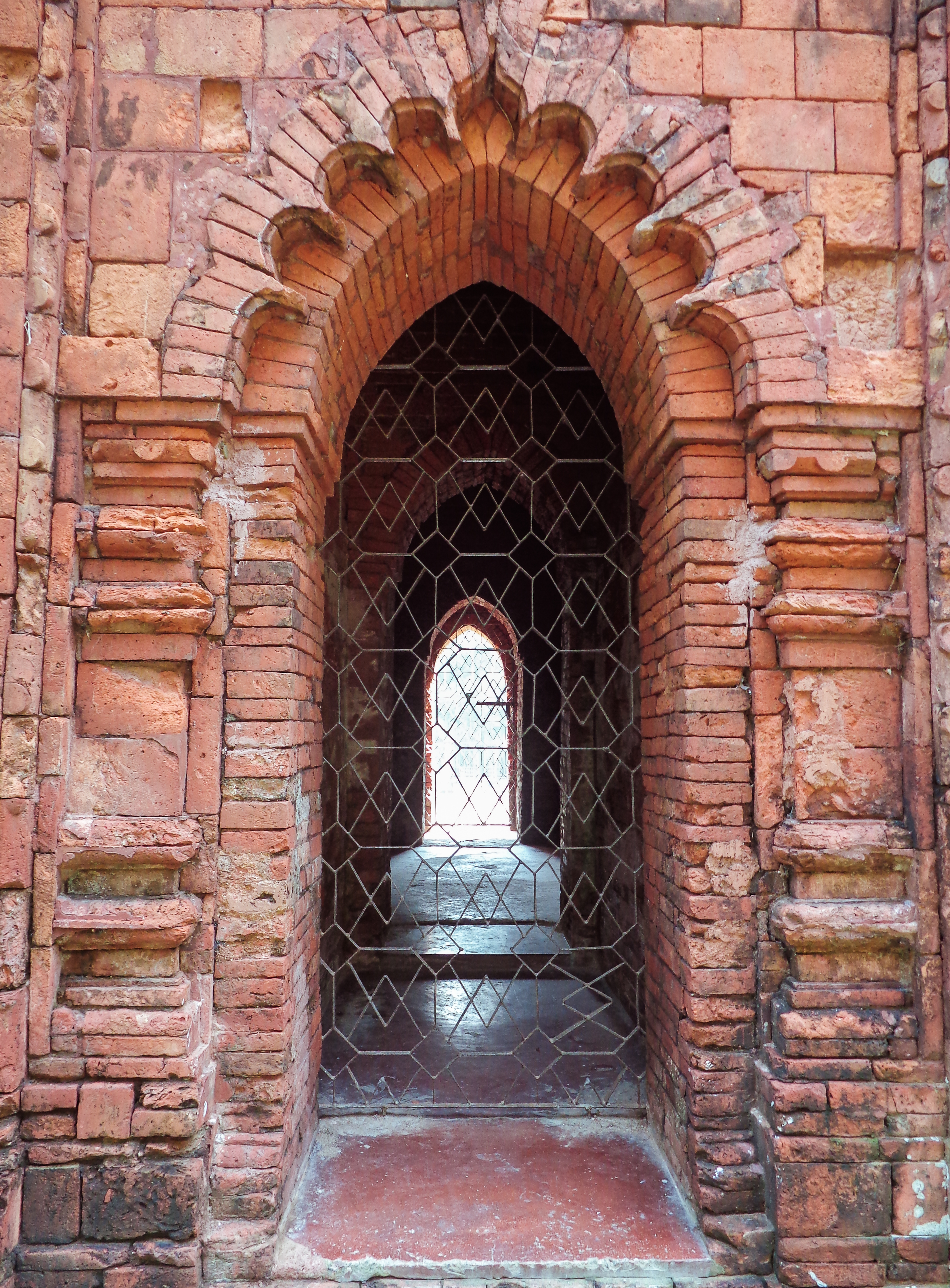 কোদলা মঠ, বাগেরহাট, খুলনা।